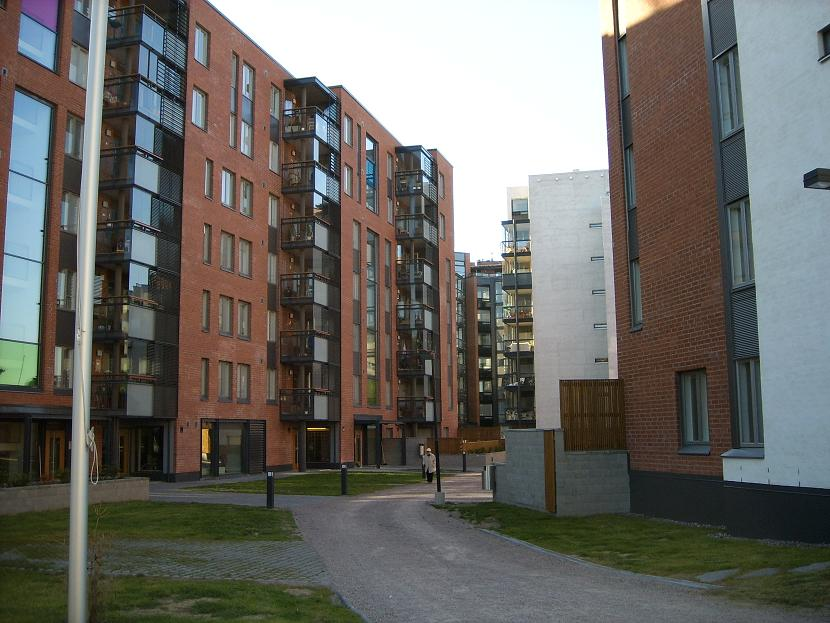 Vattuniemen asuinkerrostaloja Helsingissä